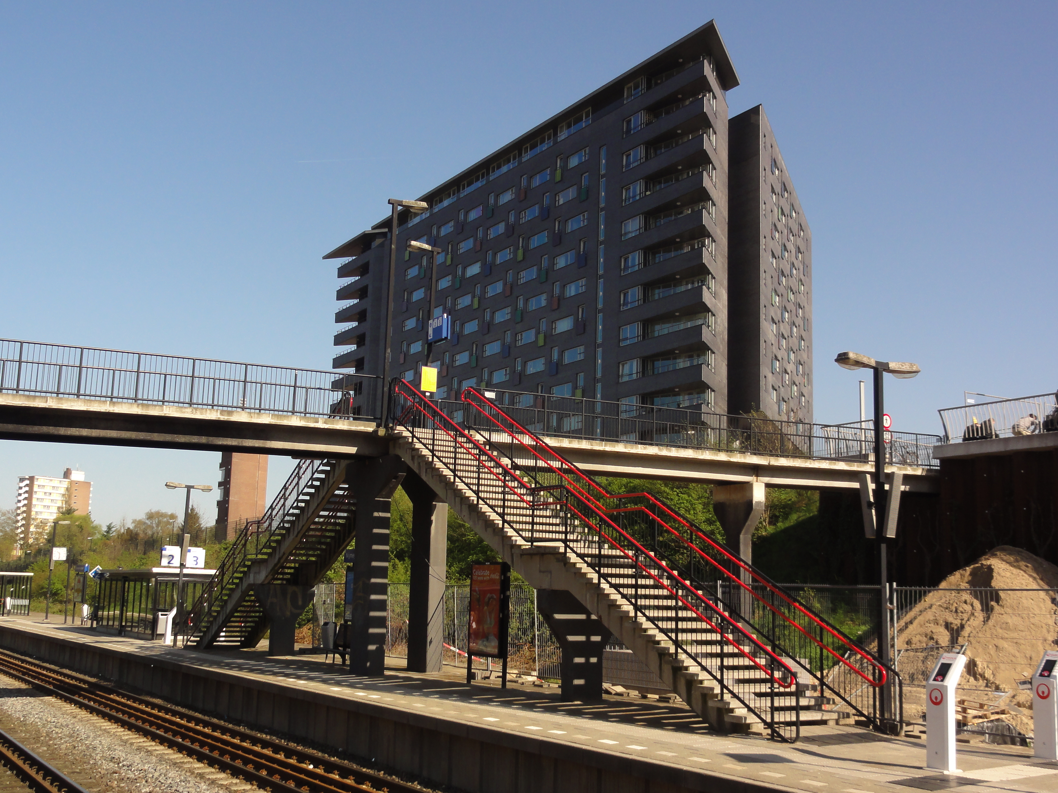 Nijmegen, studentenflat bij station Heyendaal.